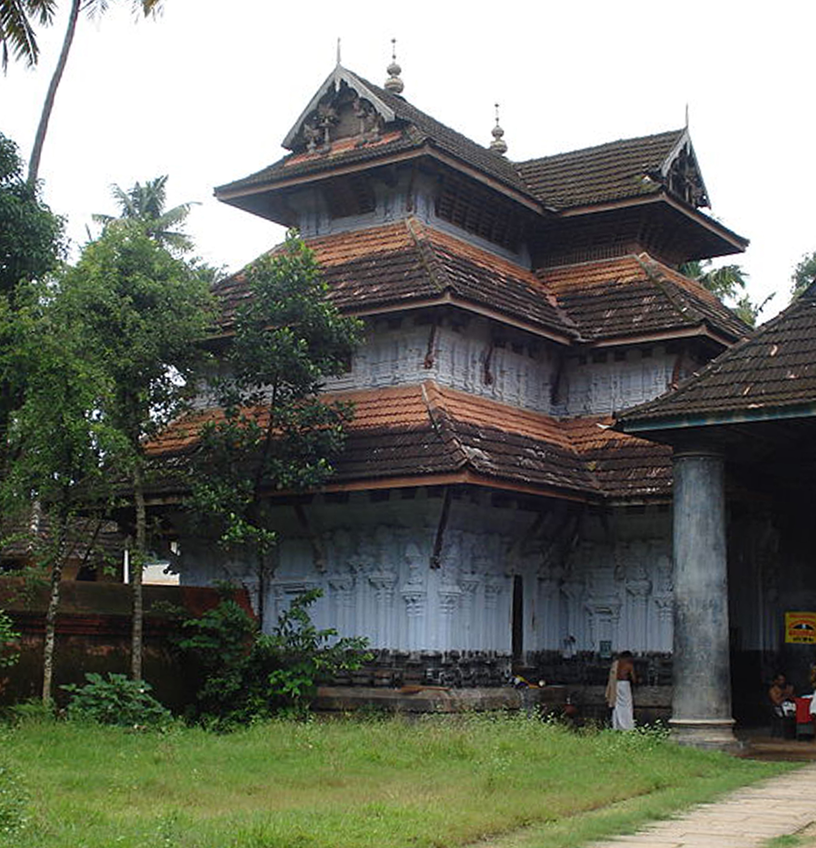 വടക്കെ ഗോപുരം